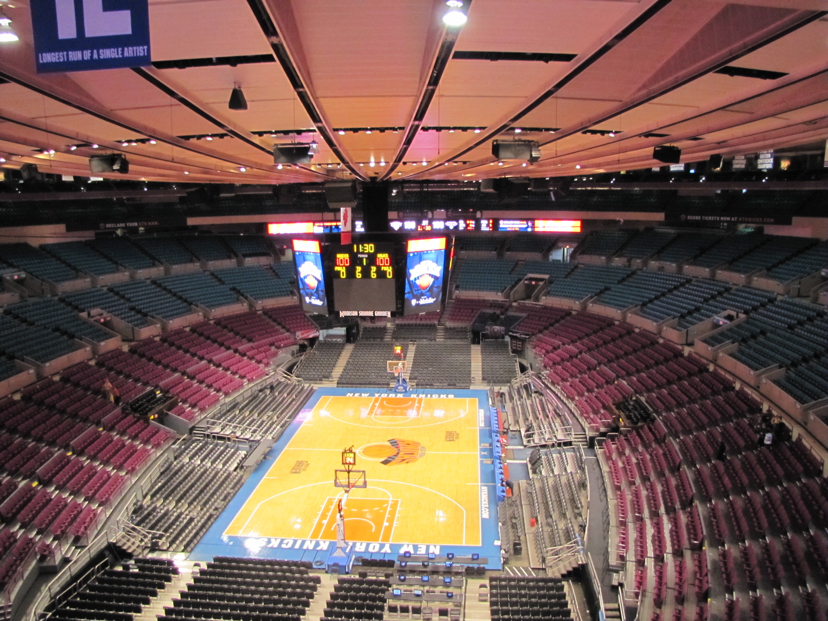 Madison Square Garden